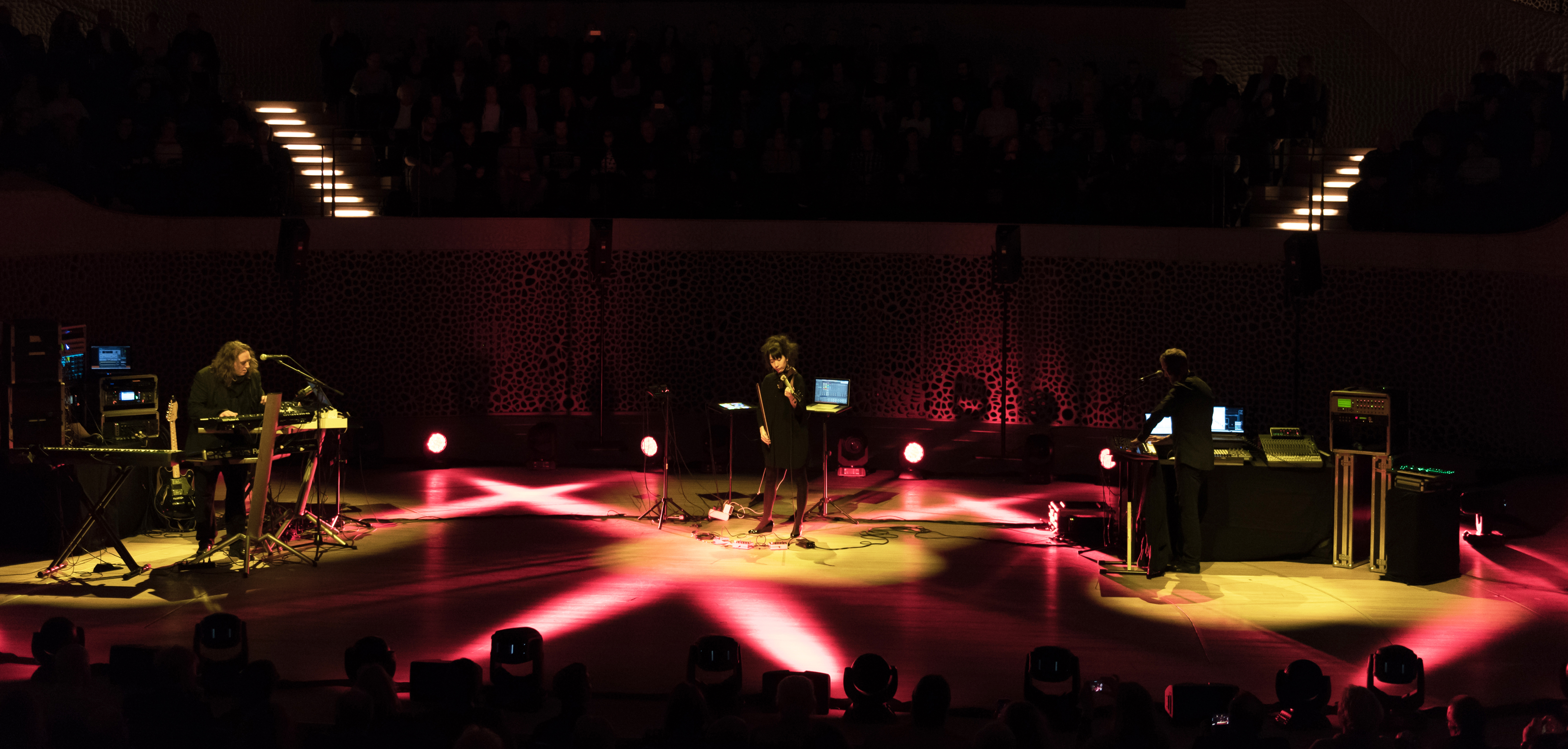 Tangerine Dream bei der Quantum of Electronic Evolution Tour in der Elbphihamonie Hamburg 2018